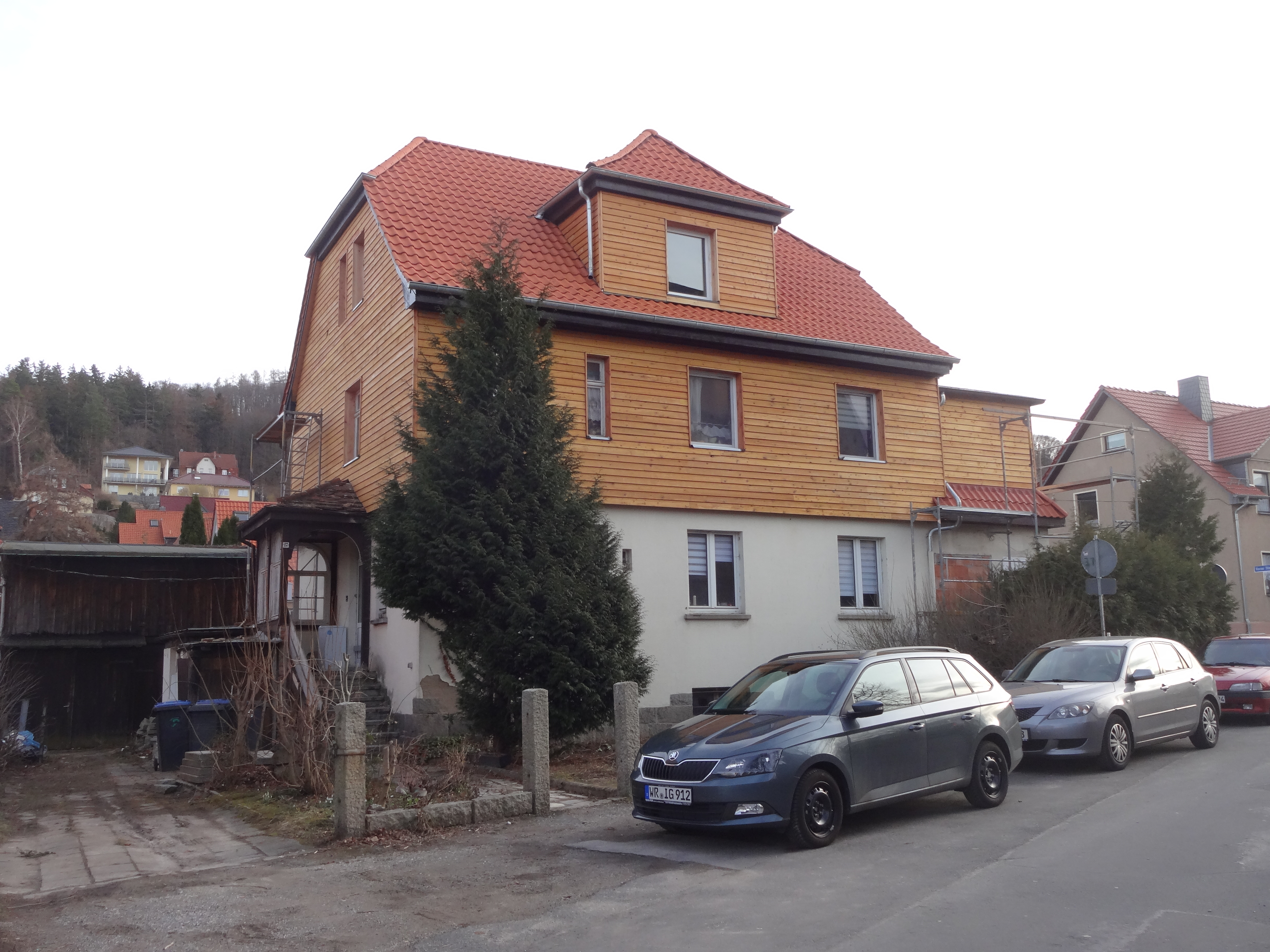 ehemals denkmalgeschütztes Wohn- und Geschäftshaus in der Kirchstraße 17 in Wernigerode